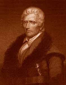 Daniel Boone, aus d. Lib. of Congress